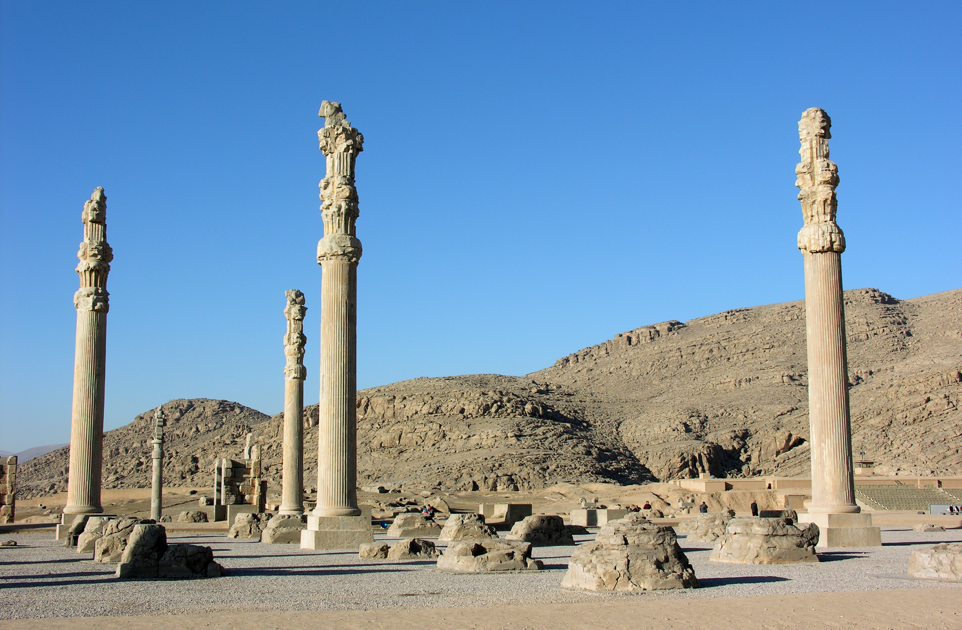 Iran, Apadana